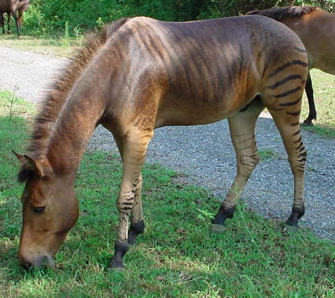 Zorse